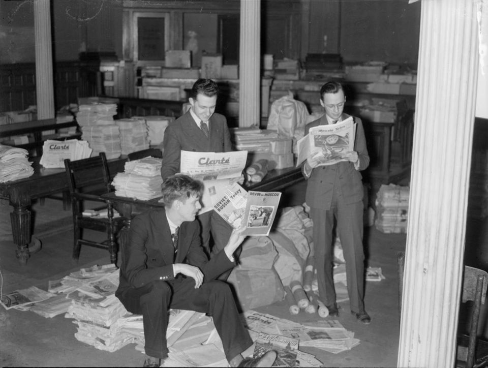 Nous voyons une salle de l'Hôtel de ville de Montréal jonchée de revues, colis et de documents divers d'allégeance communiste confisqués selon la loi du cadenas, notamment «La revue de Moscou», «La Clarté», «Soviet Russia Today». Trois hommes en civil en examinent le contenu.